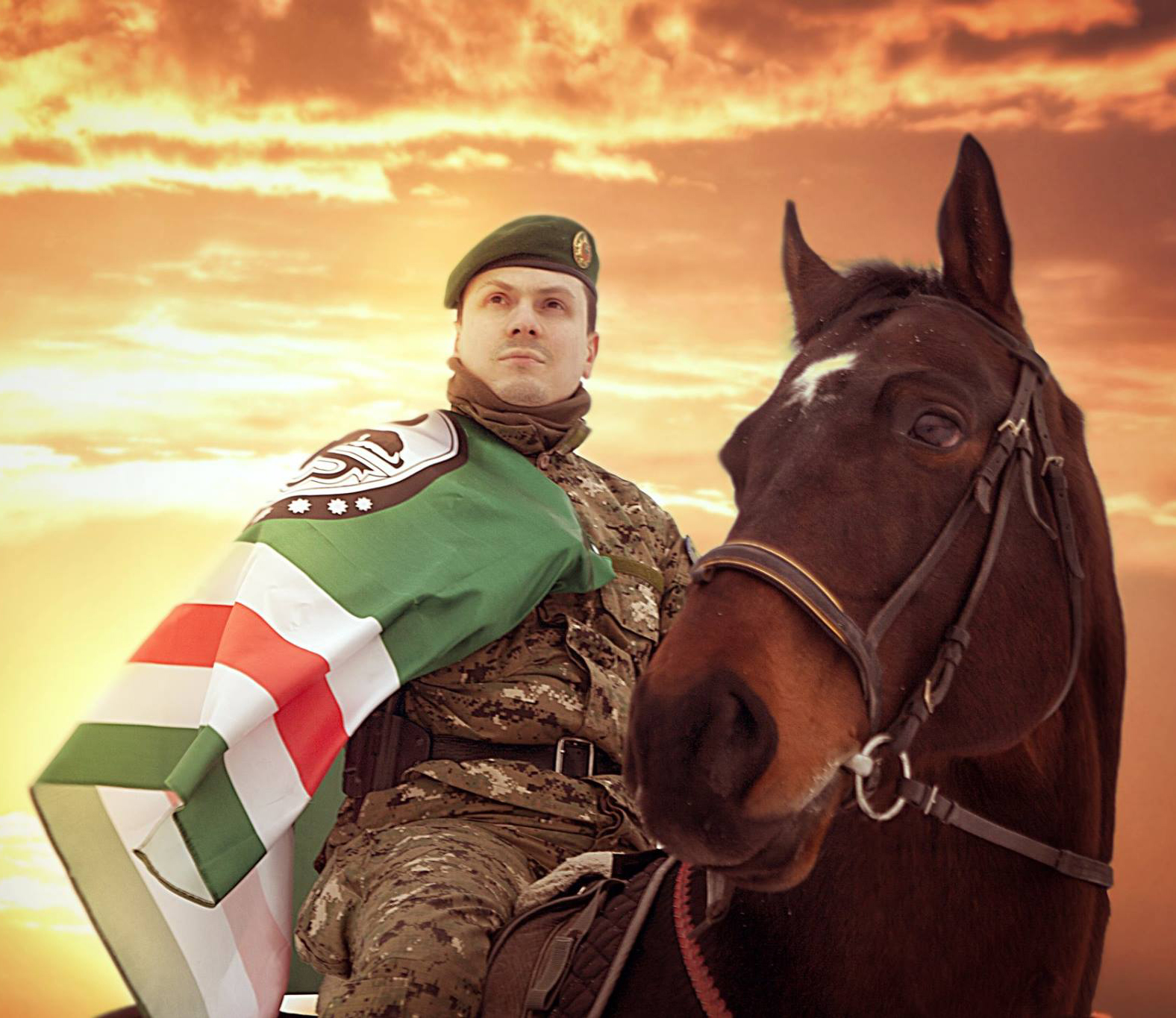 Адам Асламбекович Осмаев (родился 2 мая 1981 года в Грозном) — С 2 февраля 2015 года — командир батальона имени Джохара Дудаева.